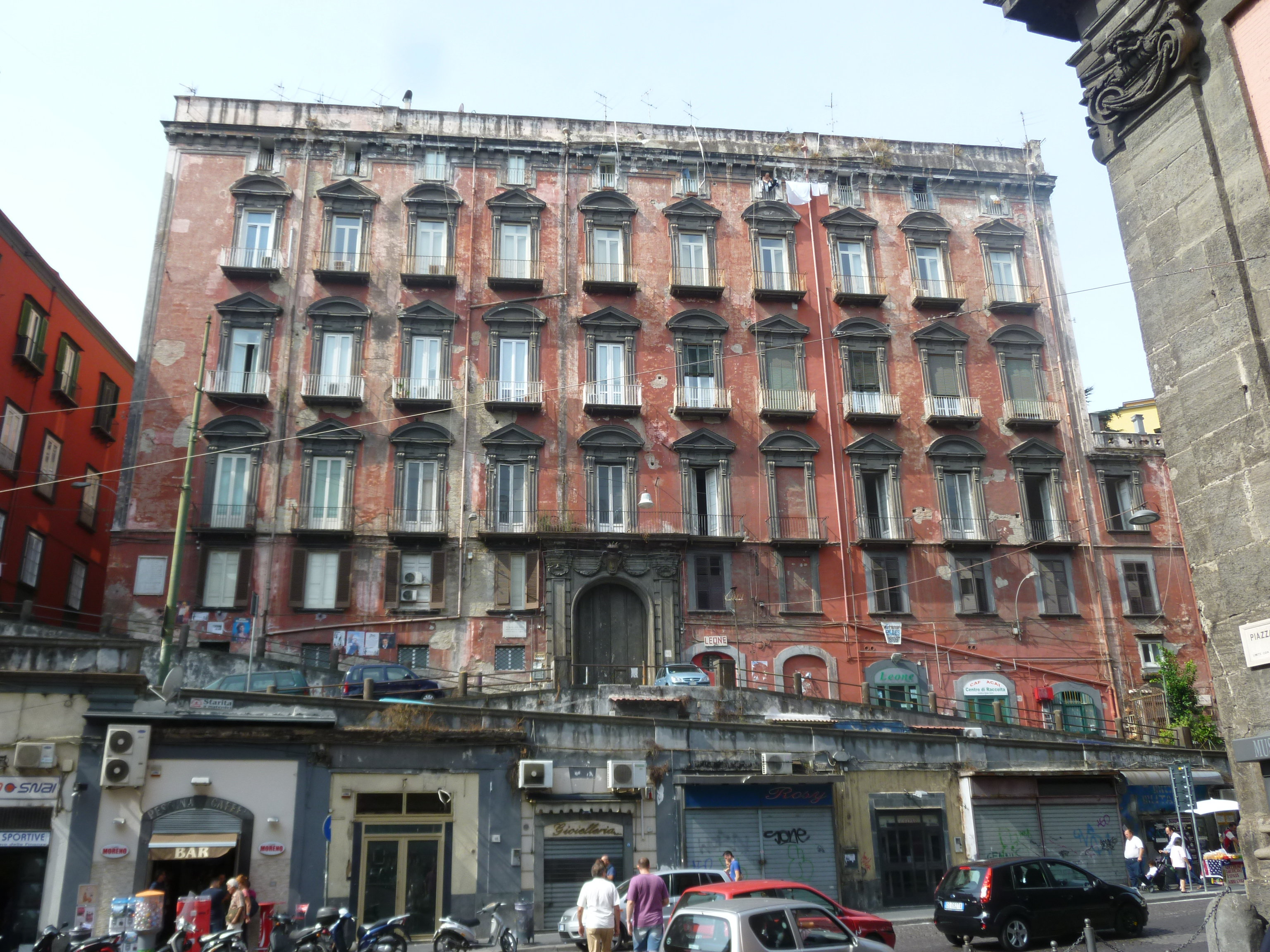 Napoli